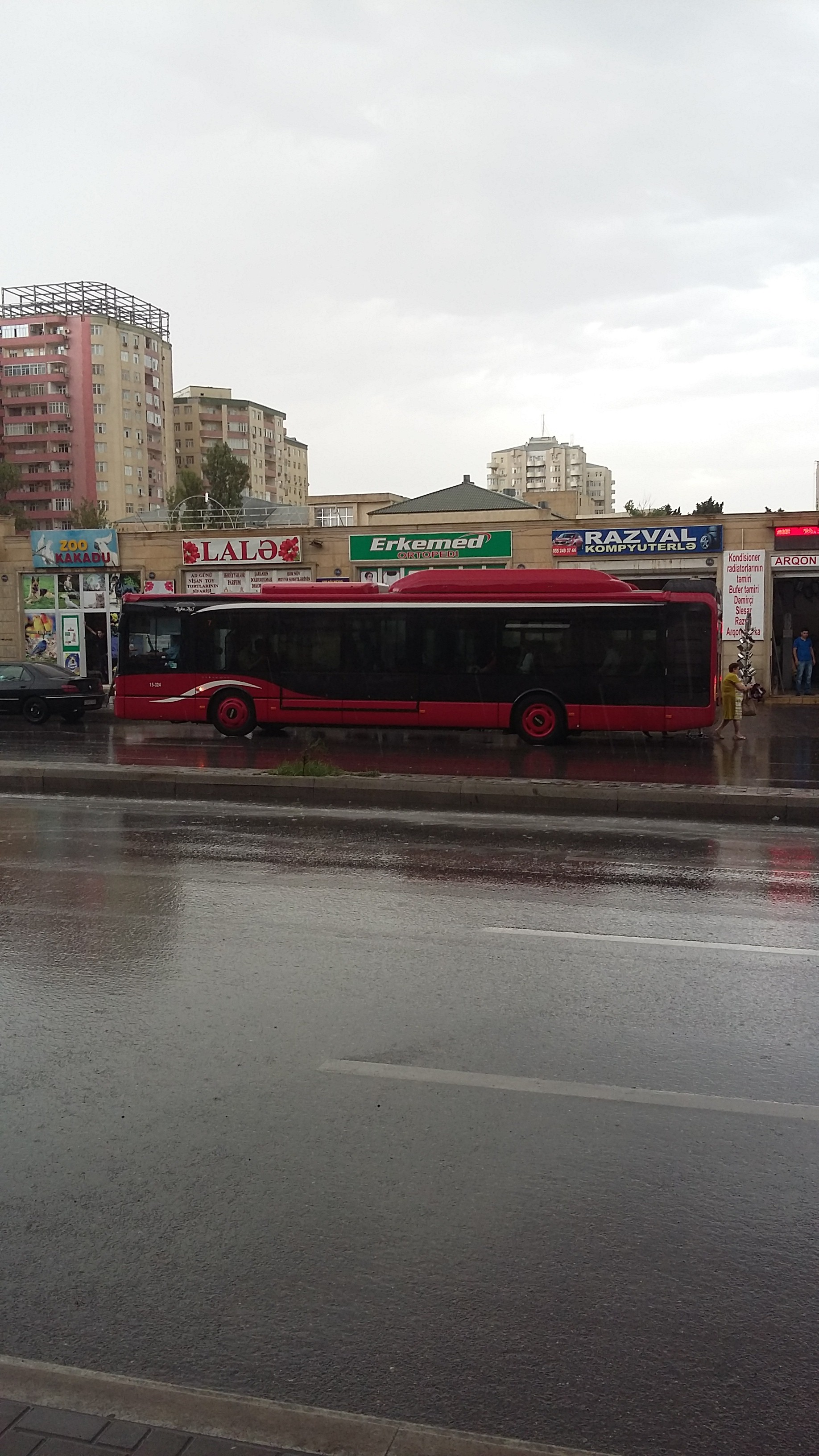 BakuBus. Şərifzadə küçəsi